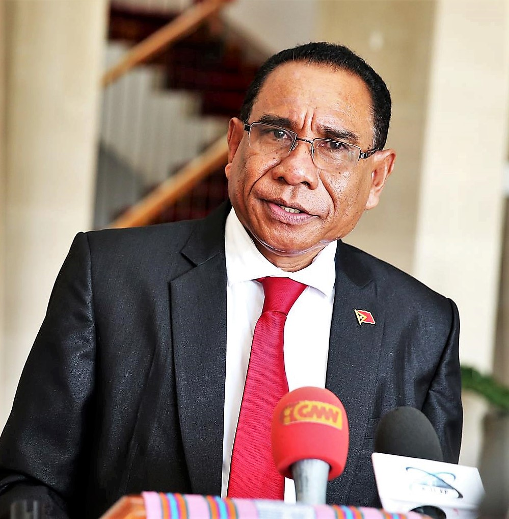 Manuel Cárceres da Costa, Justizminister Osttimors.